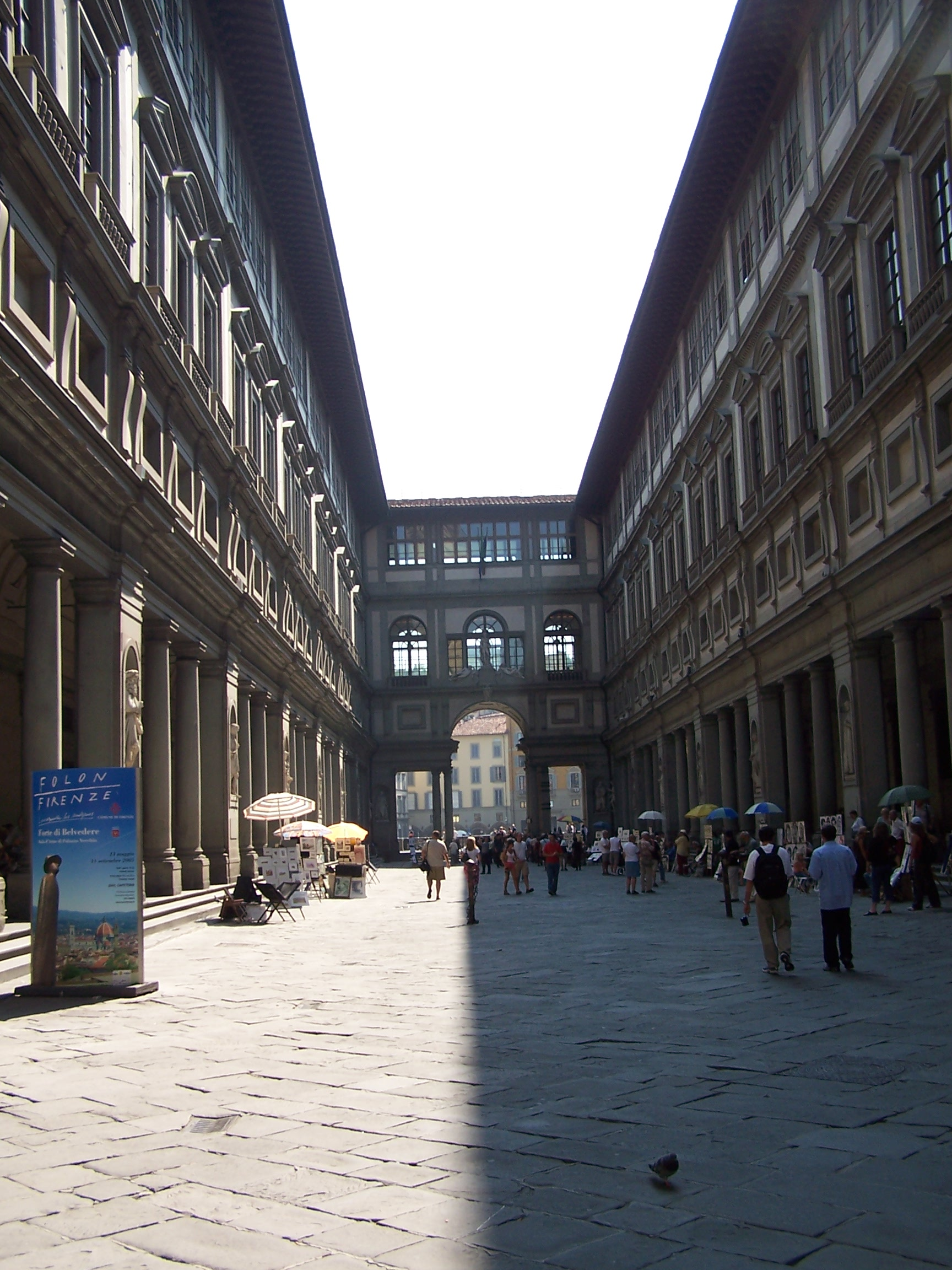 Galleria degli Uffizi, Florence